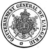 Sceau du « Gouvernement Général de l'Algérie » (plus haute autorité de l'Algérie) utilisé par le Secrétaire Général du Gouvernement, LAPAINE dans un courrier officiel le 6 août 1865. Voyez le document officiel original dans Bulletin officiel du gouvernement général de l'Algérie, Volume 5, s.n., 1866. page 340